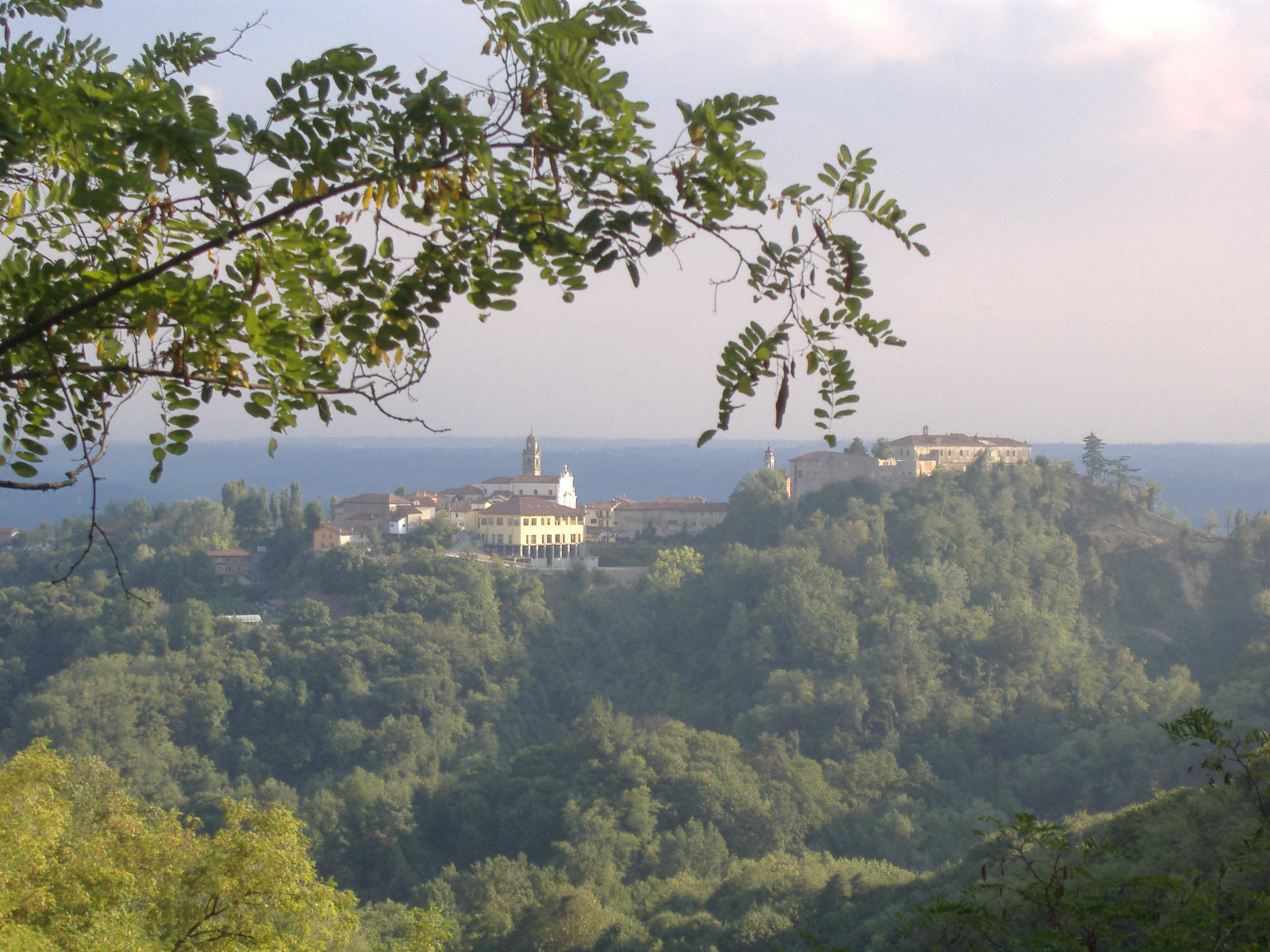 Pocapaglia, veduta dalla fraz. Mormore'